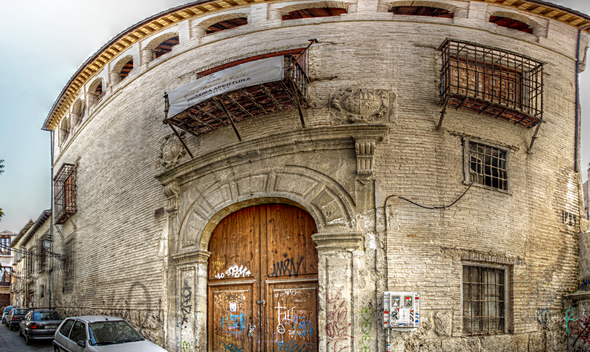 Casa de los Vargas, antiguo "de Salazar".